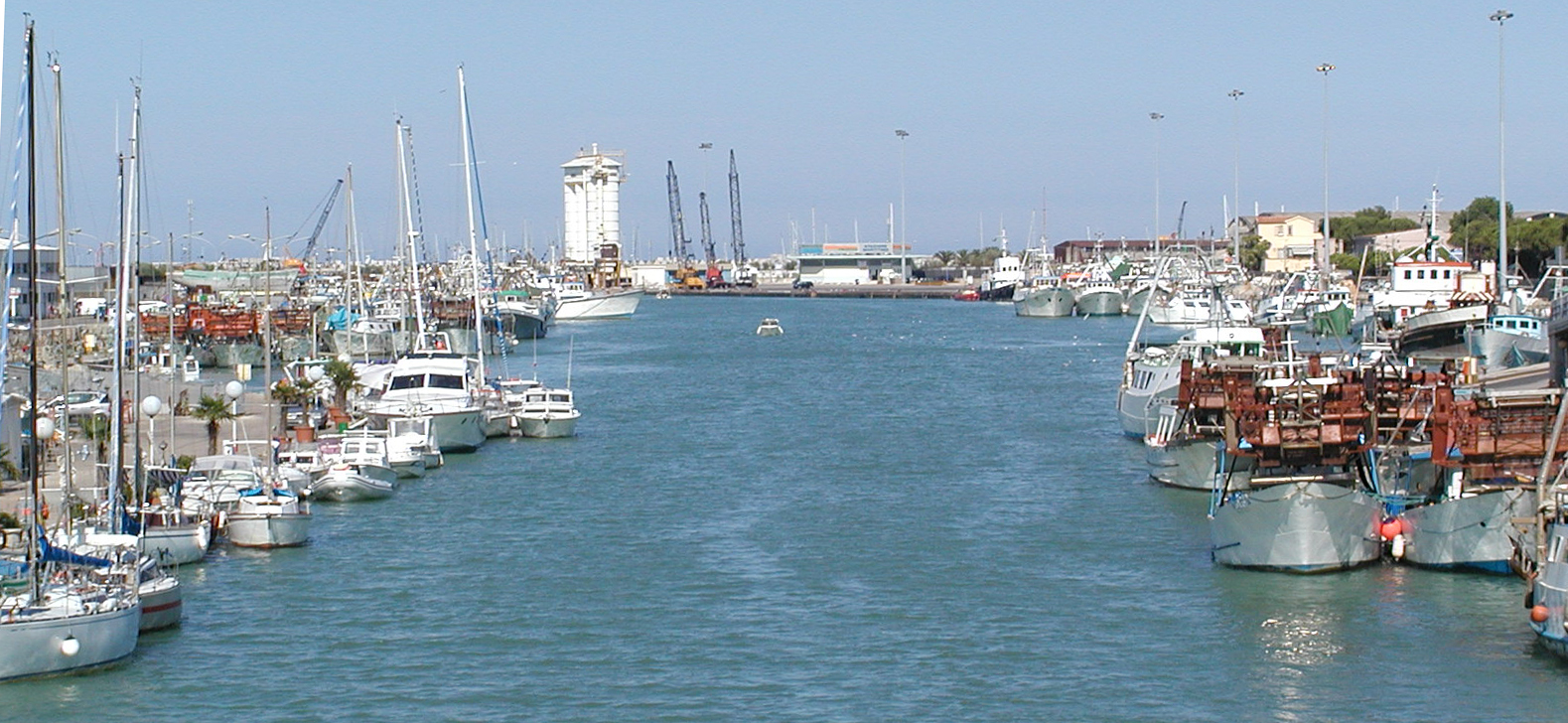 Der Hafen von Pescara